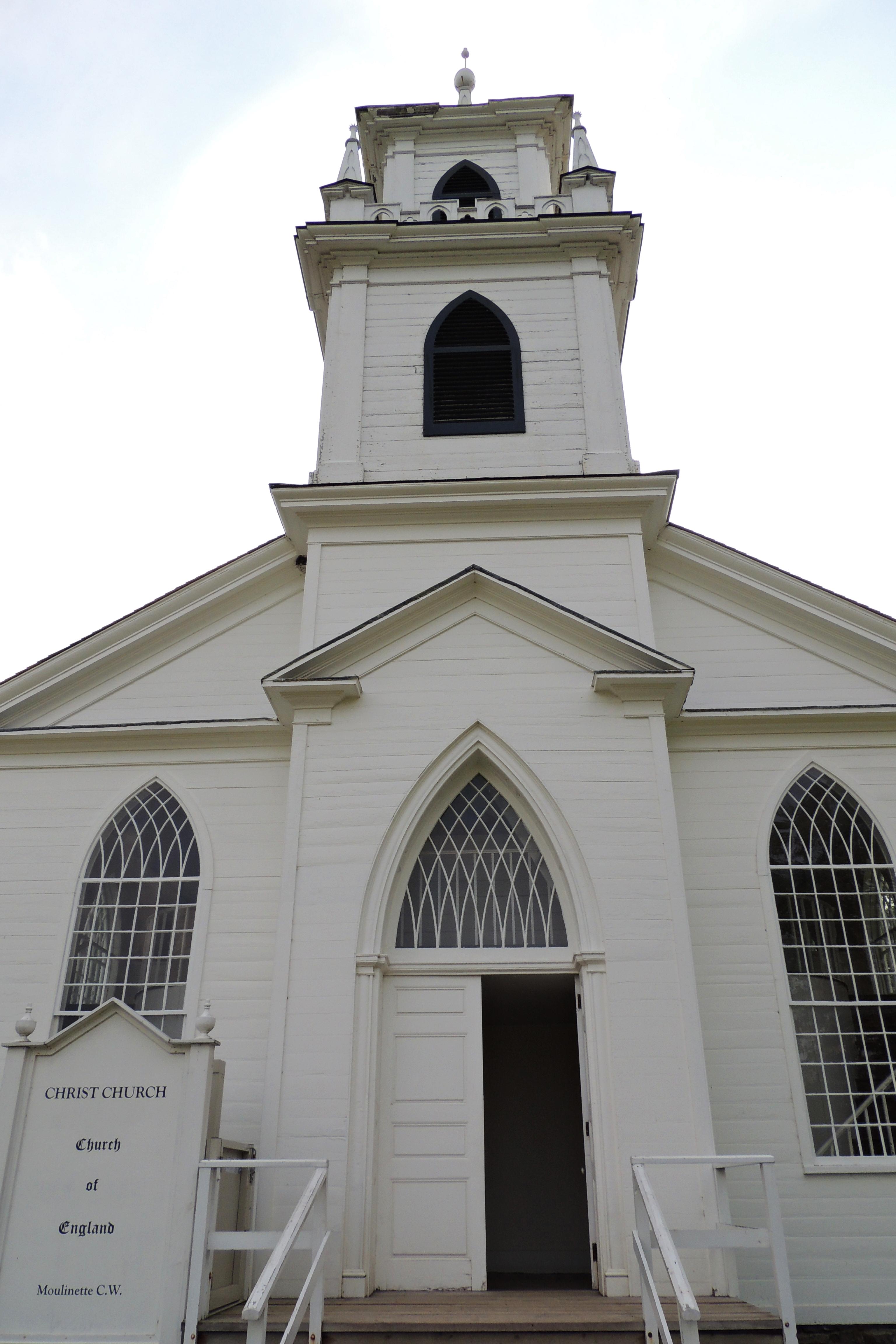 Iglesia - Upper Village Canadá